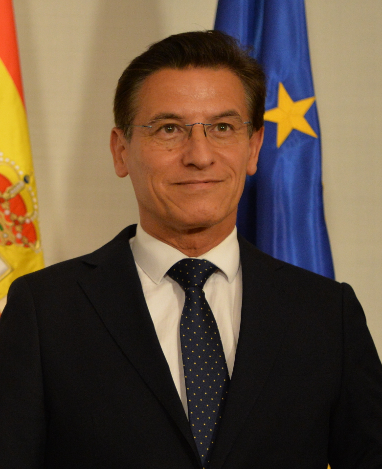 2019_07_09. Sevilla.- El presidente Moreno, ha recibido al alcalde de Granada, Luis Salvador en el Palacio de San Telmo. __ Fotografía oficial de la Junta de Andalucía, se pone a disposición solamente para su publicación por las organizaciones de noticias y/o para la impresión de uso personal por parte del sujeto (s) de la fotografía. La fotografía no puede ser manipulada de ninguna manera y no se puede utilizar en materiales comerciales o políticos, los anuncios, productos, promociones que de alguna manera sugieran aprobación o respaldo de la Junta de Andalucía.